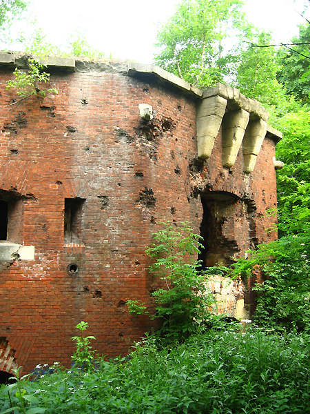 Lviv, Citadel fortress 02